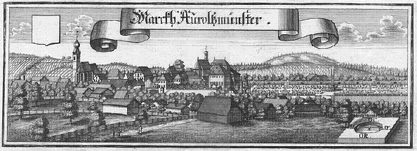 Zeitgenössische Ansicht von Aurolzmünster.